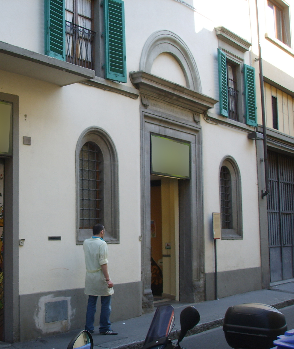 Ex spedale dello spirito santo